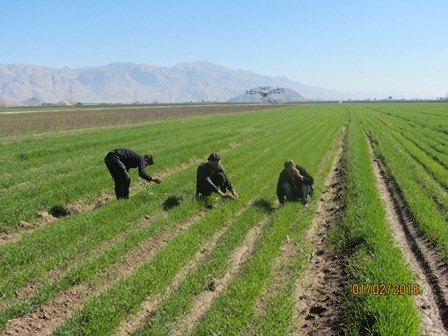 كشاورزي در روستاي داراب